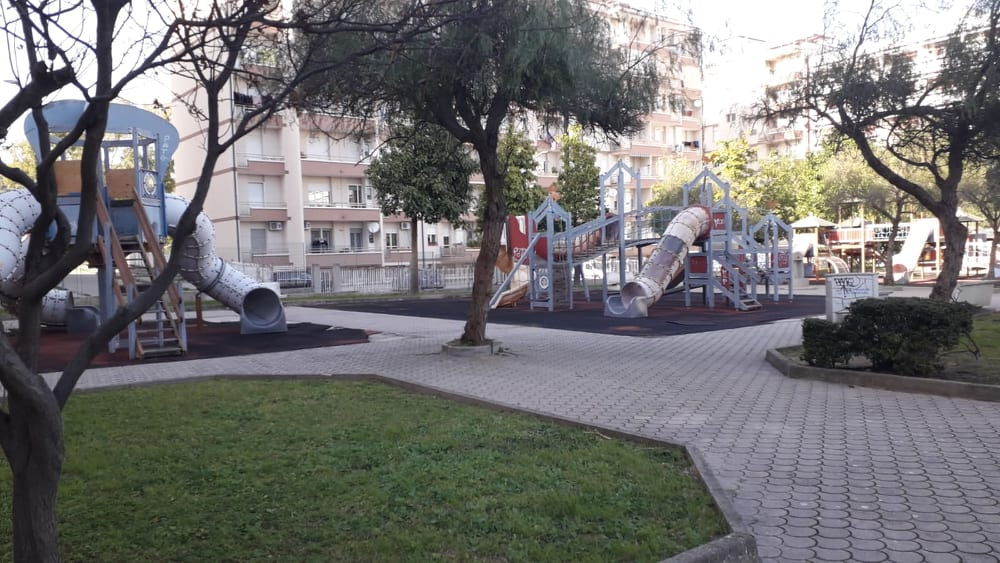 parco giochi quartiere corvo catanzaro